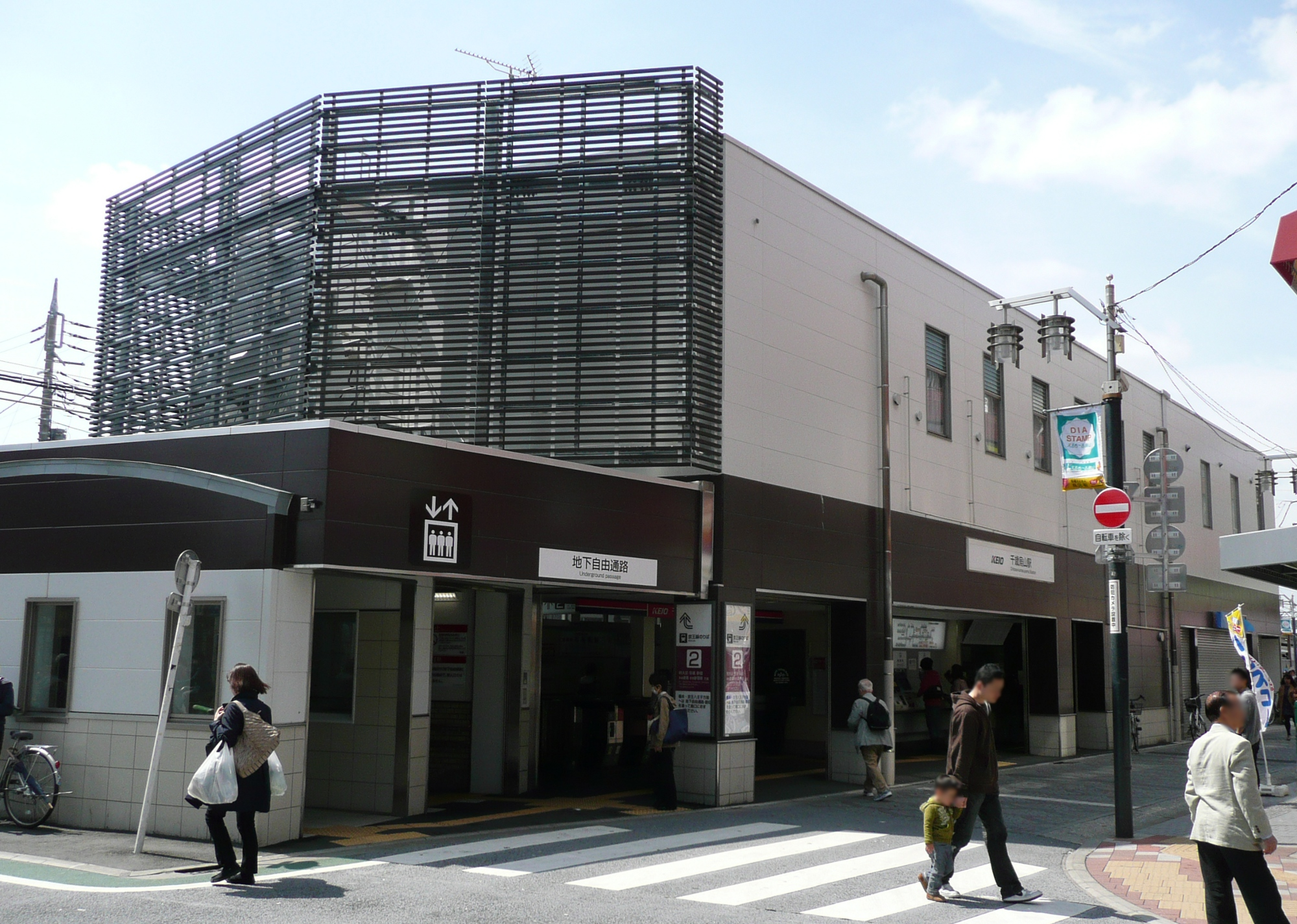 千歳烏山駅北口